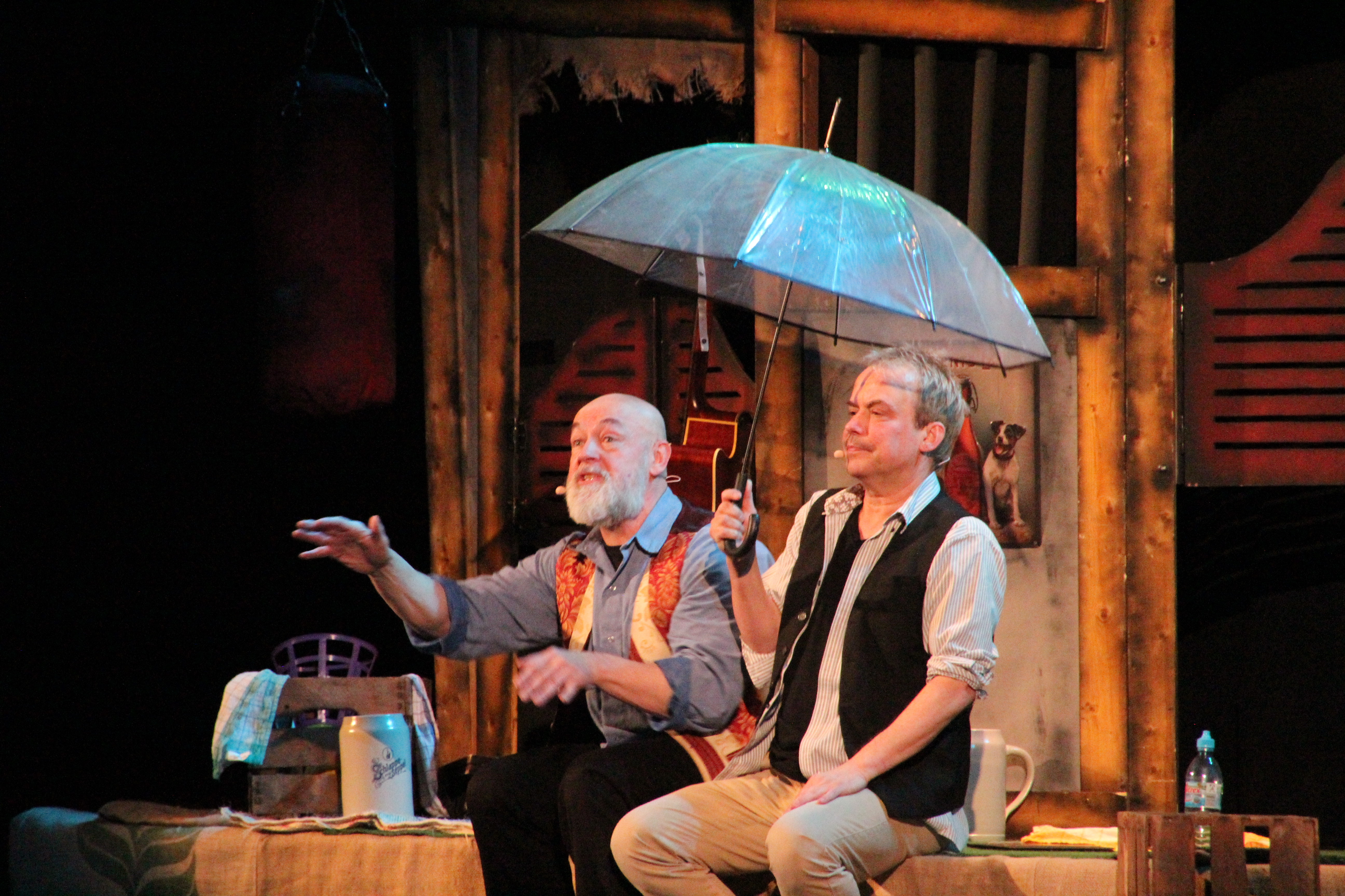 Bildinhalt: Links Gerd Knebel, rechts Henni Nachtsheim in der "Badesalz"-Show "Dö Chefs!". Aufnahmeort: Frankfurt-Höchst, Deutschland